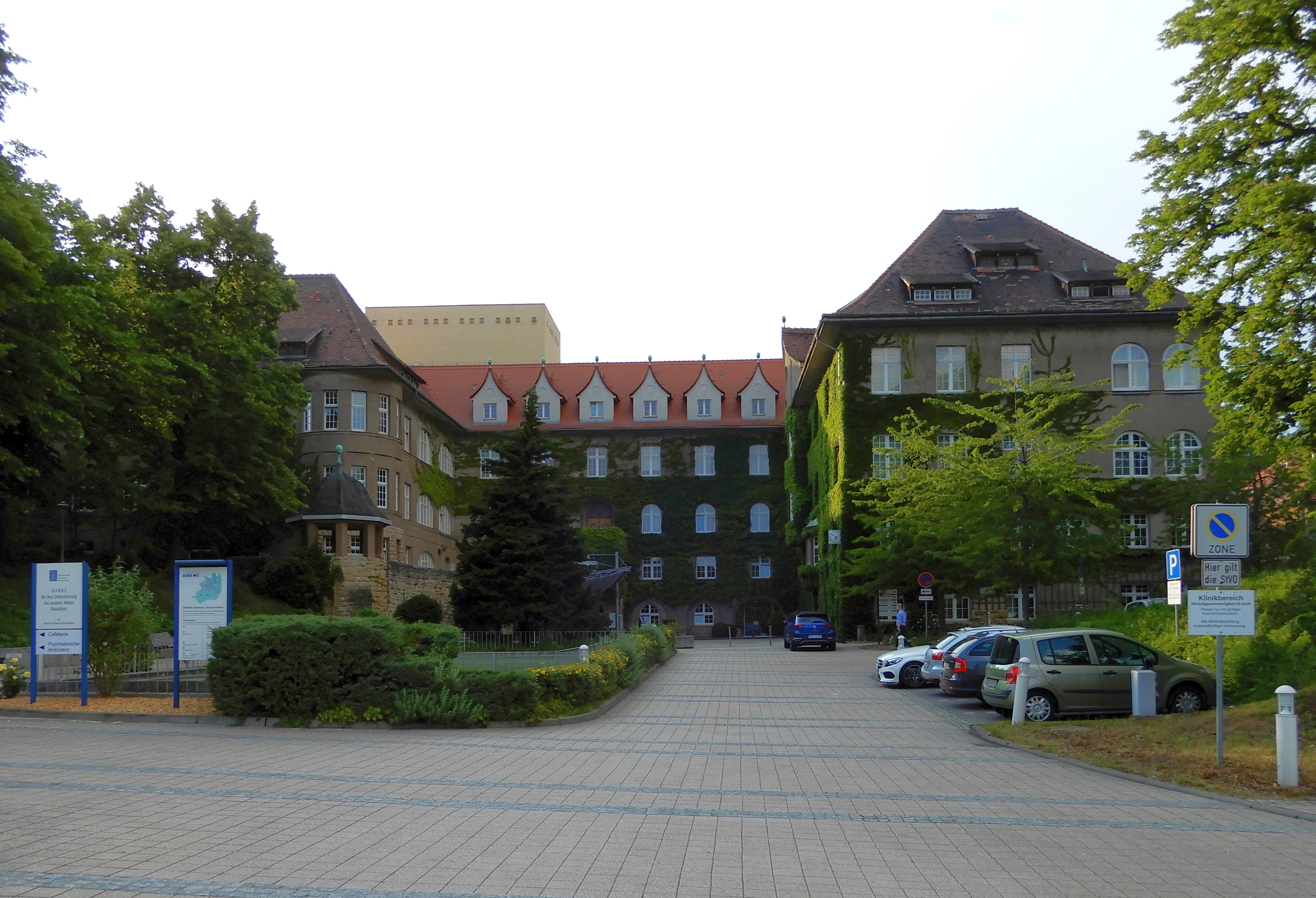 Krankenhaus Eislebener Straße 7a in Aschersleben